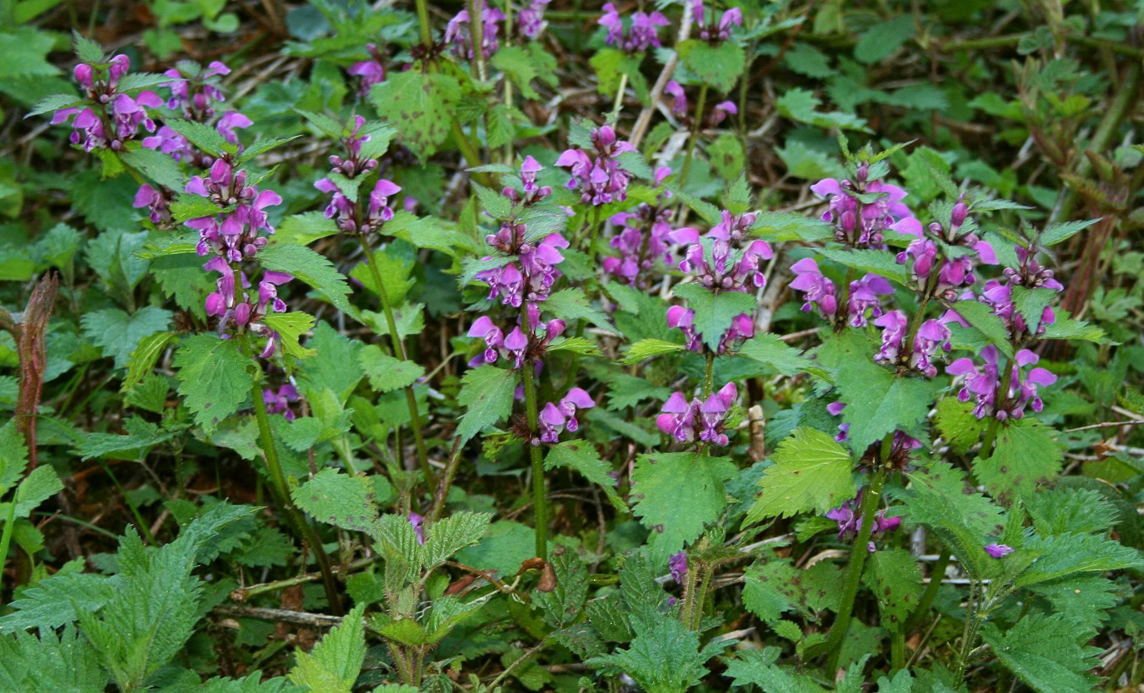 Gefleckte Taubnessel (Lamium maculatum), Lippenblütler (Lamiaceae) – Österreich/Austria/Autriche: Tirol, Kitzbüheler Alpen, Jochbergwald ca. 2,5 km N Pass Thurn, ca. 1060 m